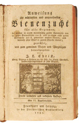 Plate from Naturgeschichte, Klassifikation und Nomenklatur der Insekten vom Bienen,....